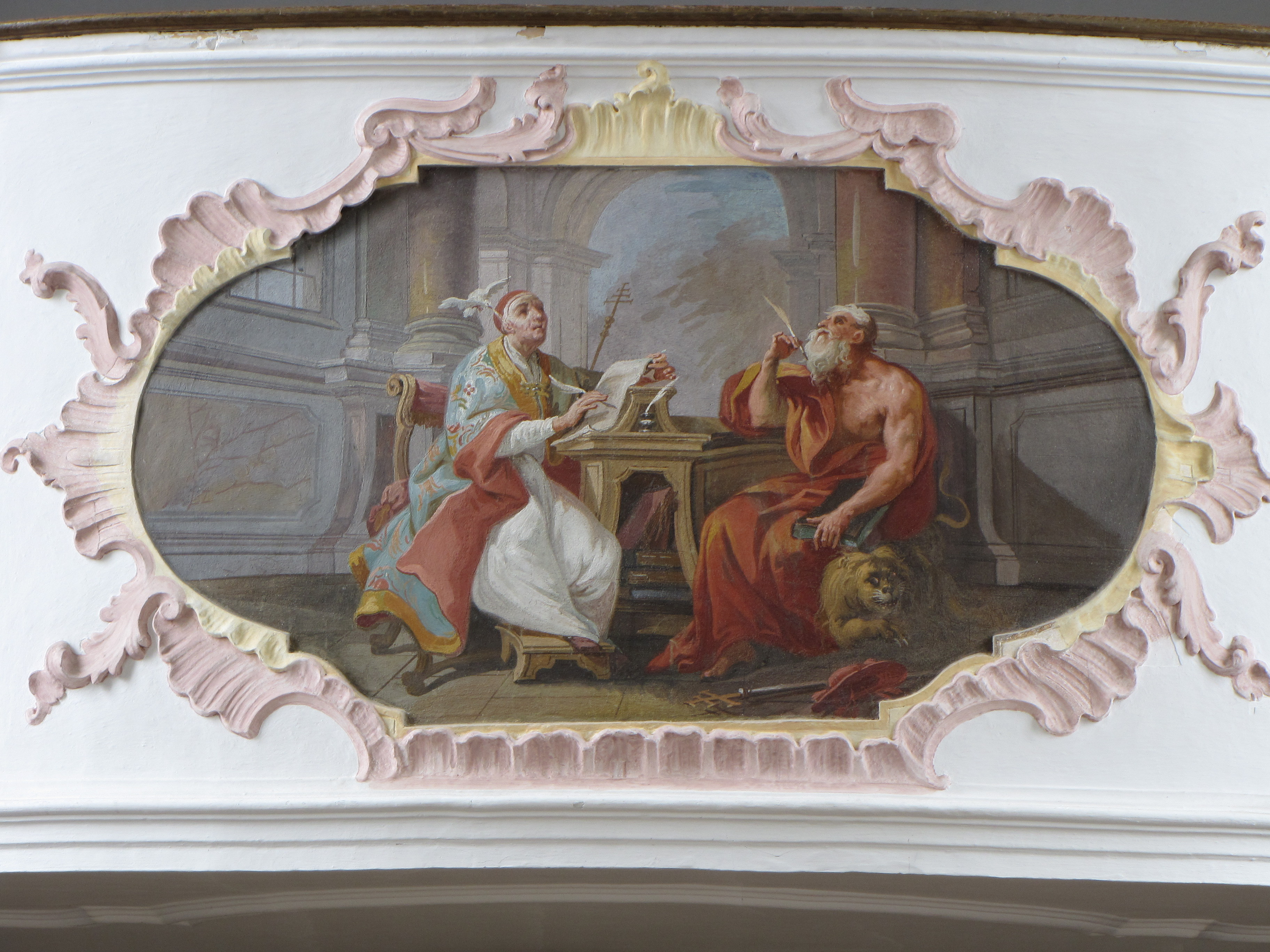 Emporenbild von Franz Anton Zeiller in der Kirche von Sachsenried, 1753